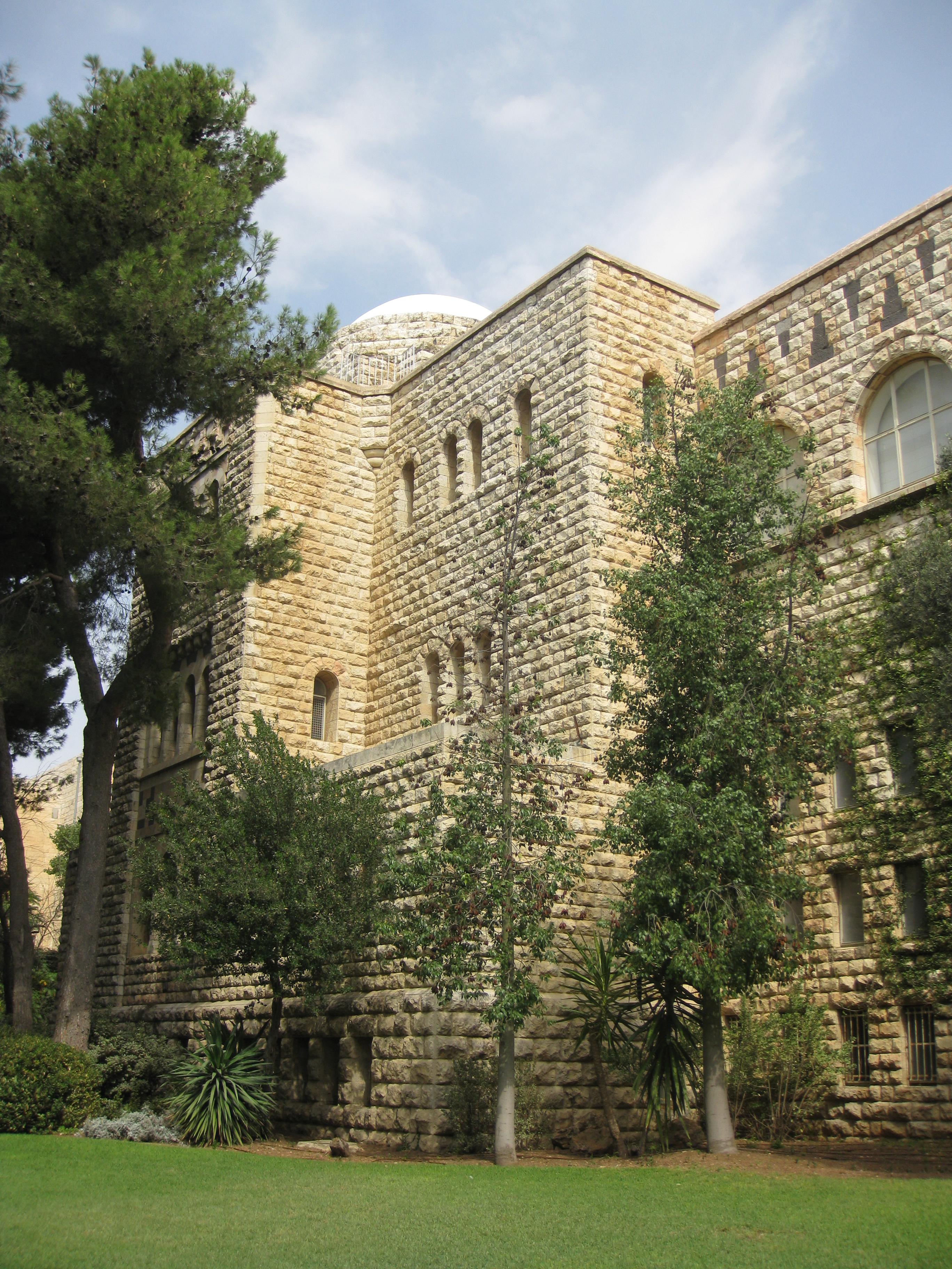 Mount Scopus הר הצופים